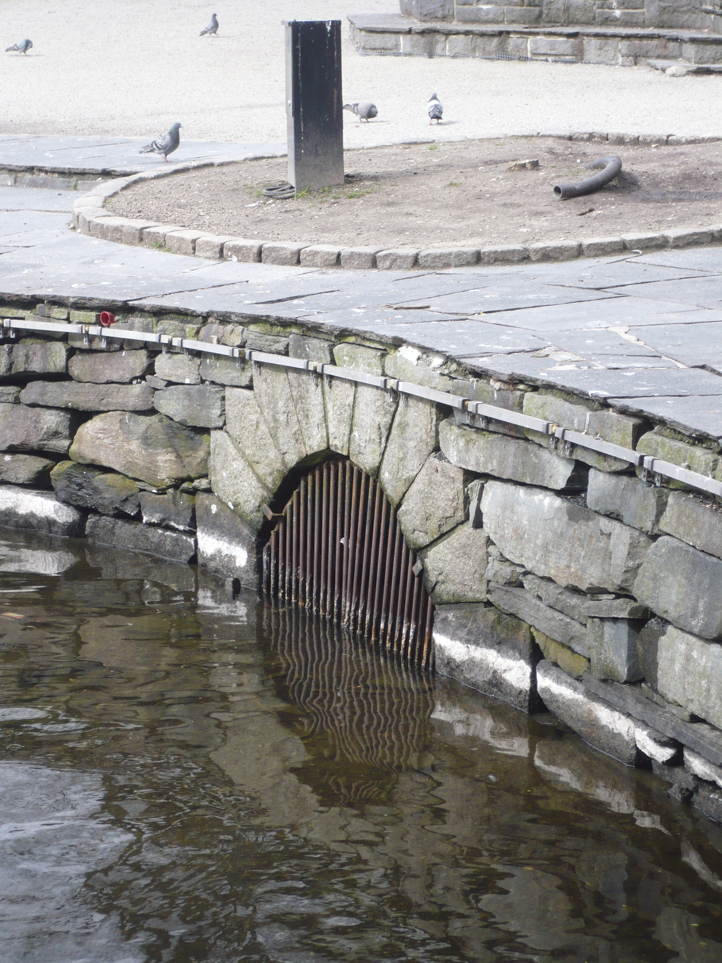 Innløpet til Skolebekken fra Breiavatnet i Stavanger